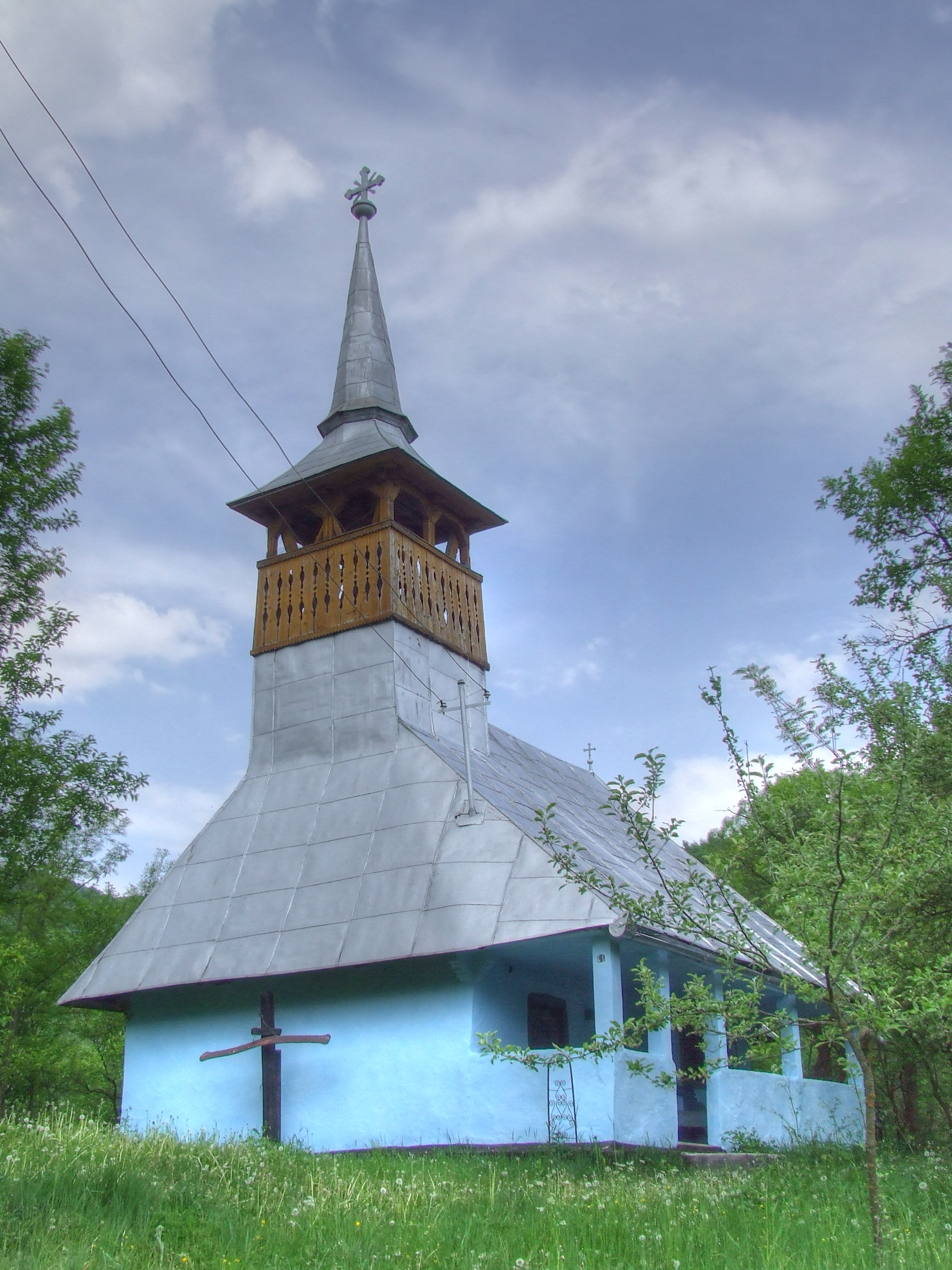 Biserica de lemn din Măgura Ierii, județul Cluj.